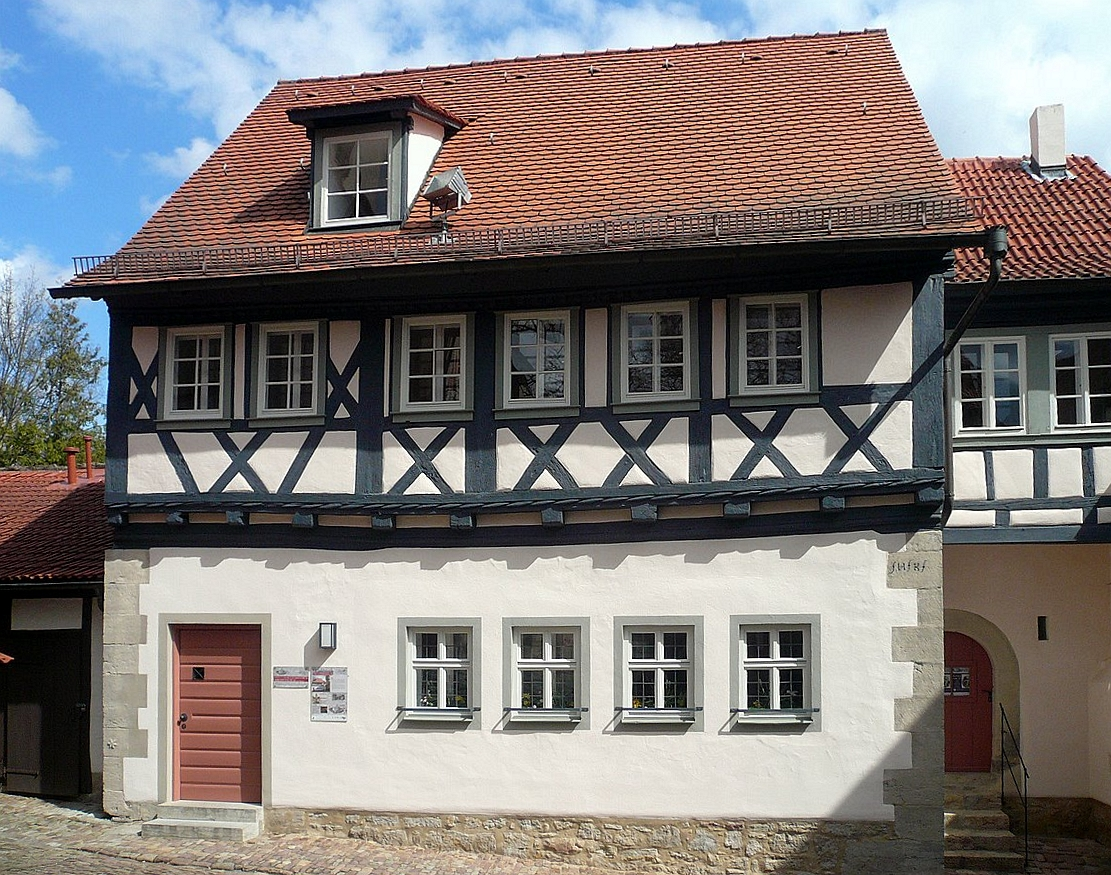 Kirchenburg Ostheim, Schulgebäude